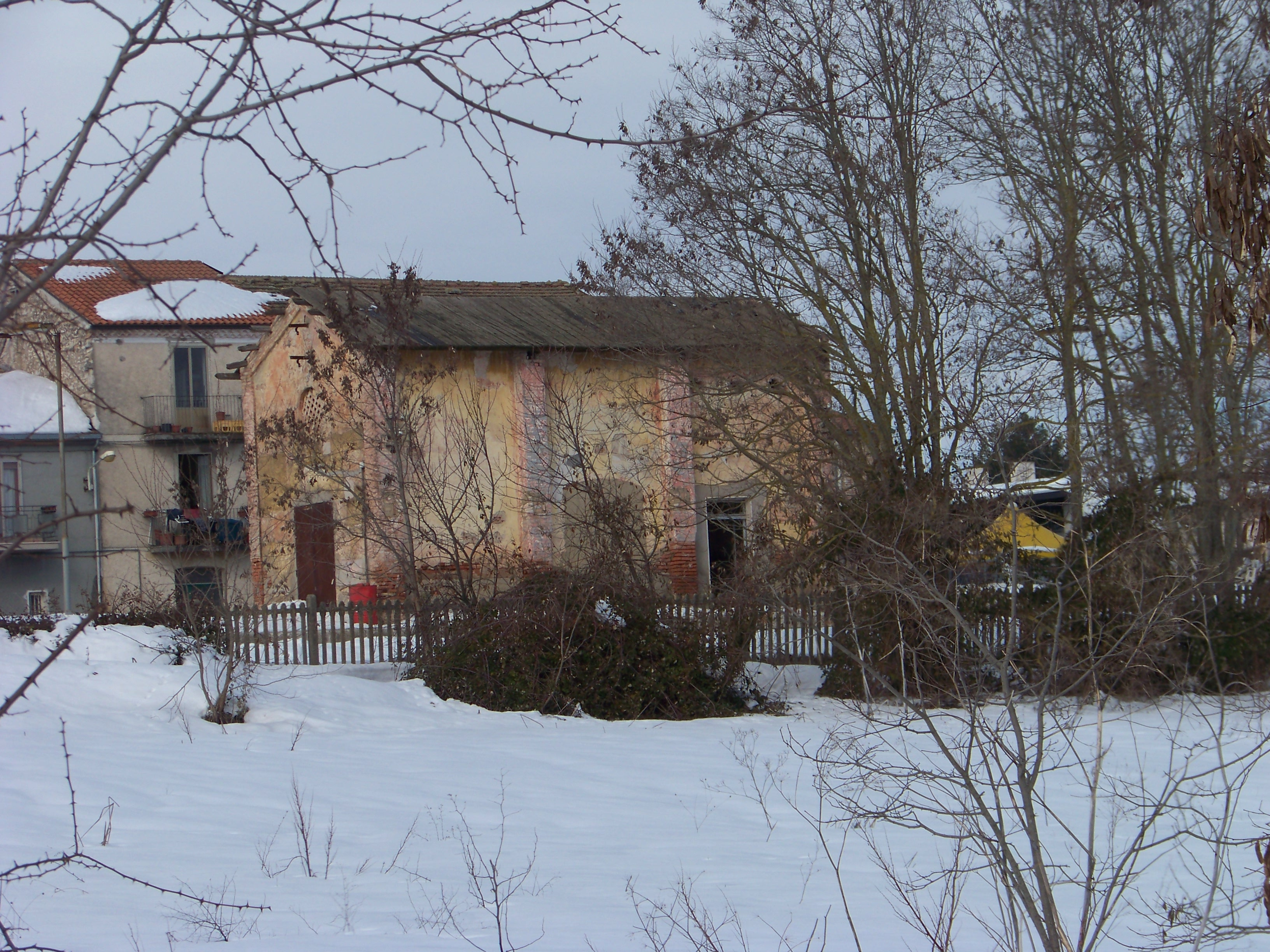 Stazione di Matrice-Montagano-San Giovanni in Galdo, rovine del magazzino merci